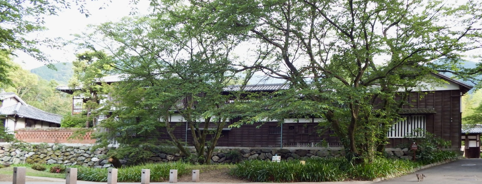 広瀬歴史記念館の外観